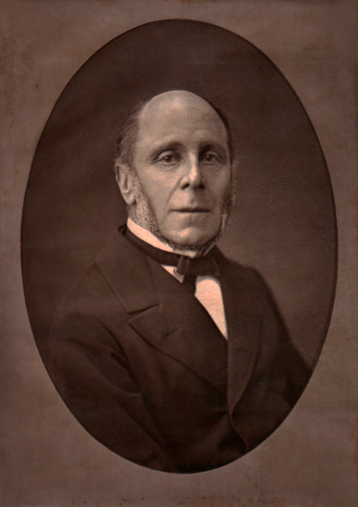 Louis Martel, Président du Sénat